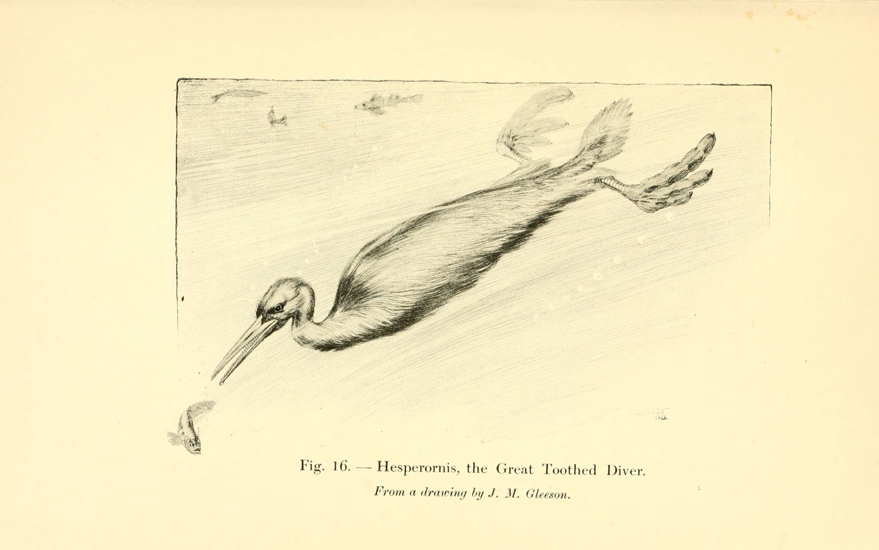 m o o p -^ be